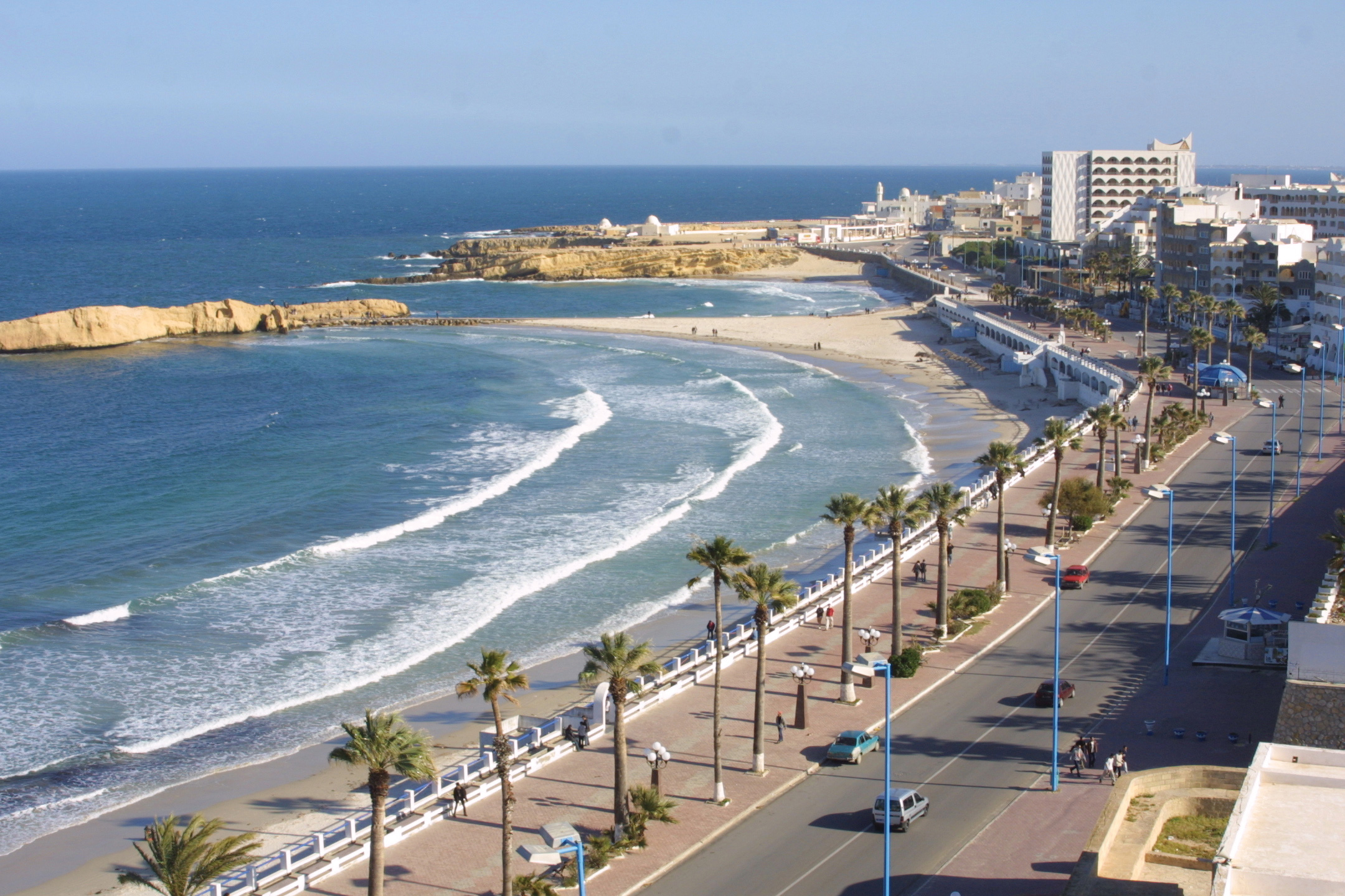 مدينة المنستير شاطئ القراعية